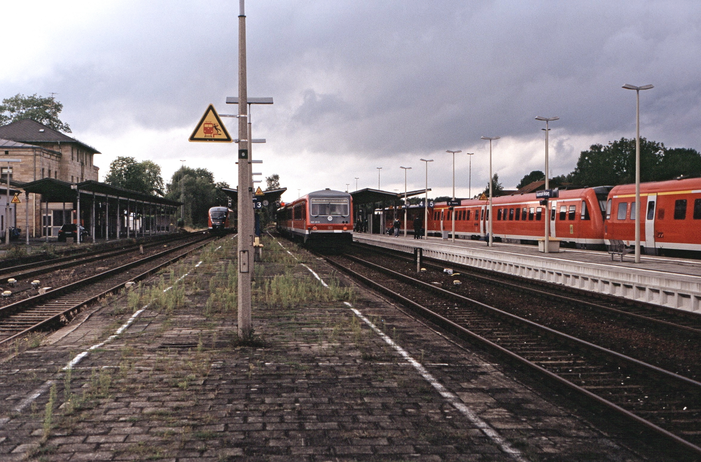 Bahnhof Neuenmarkt-Wirsberg 20060826/01